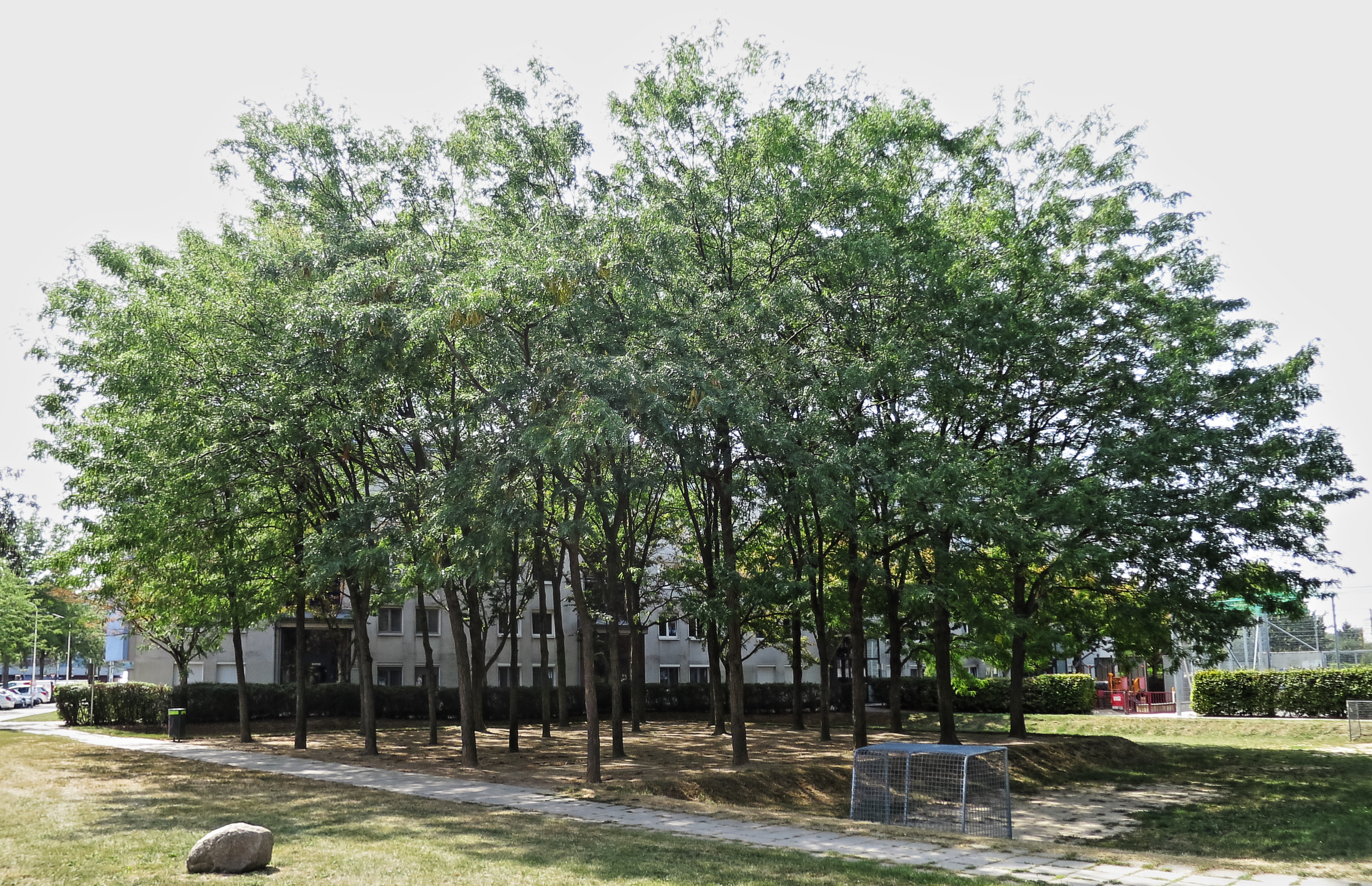 Wien-Donaustadt, Trygve-Lie-Park, Baumgruppe Lederhülsenbäume